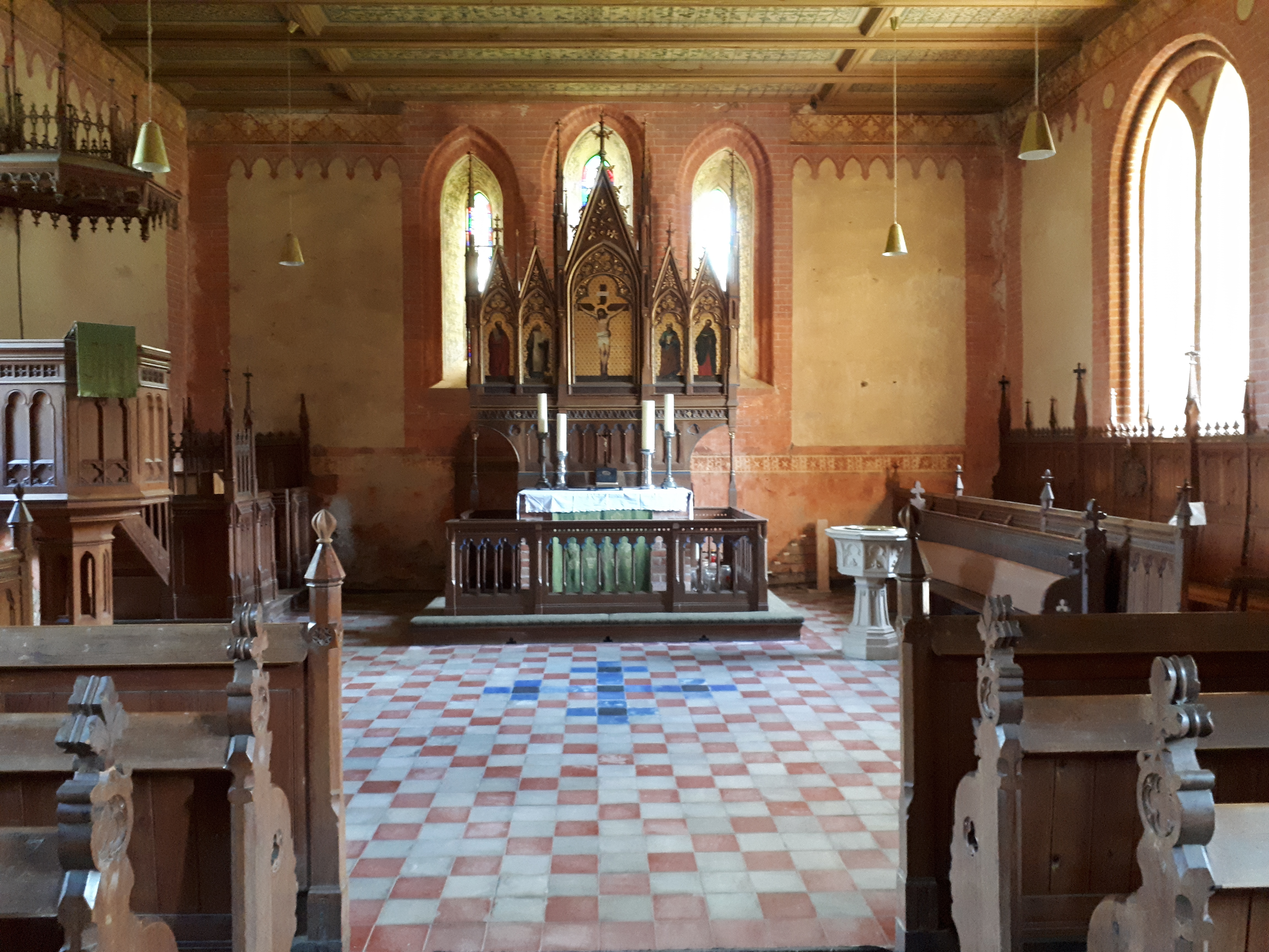 Man sieht den Innenraum der Dorfkirche Chemnitz von der Winterkirche aus